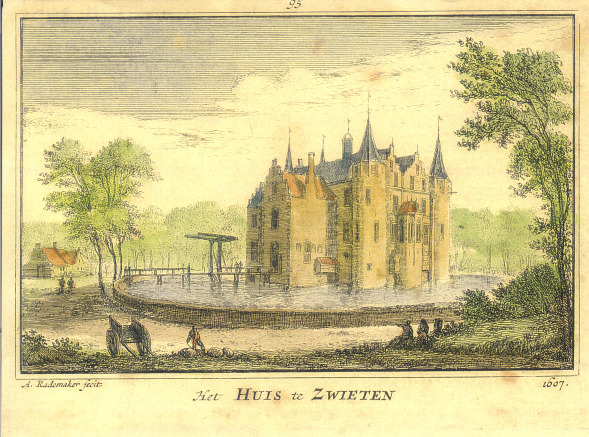 Het huis van Zwieten uit 1607. Afbeelding gebruikt met toestemming van Stichting Oud Zoeterwoude, Postbus 101, 2380AC Zoeterwoude.